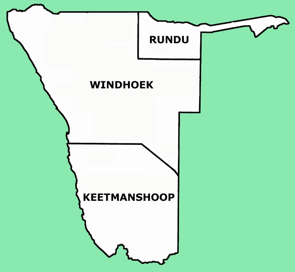 Mappa delle diocesi cattoliche della Namibia. Lavoro personale, a partire da questa immagine di Commons. Fonte utilizzata per i confini: Guida delle missioni cattoliche 2005, a cura della Congregatio pro gentium evangelizatione, Roma, Urbaniana University Press, 2005 Categoria:Chiesa cattolica in Namibia